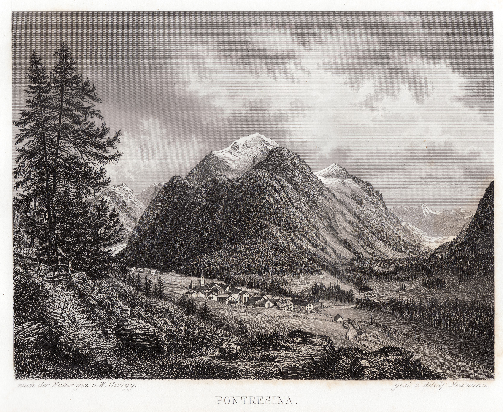 Pontresina - gezeichnet von Wilhelm Georgy, gestochen von Adolf Neumann